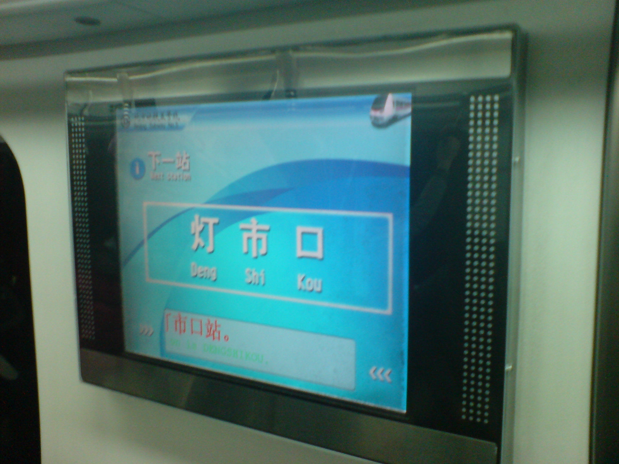 北京地铁5号线内的报站LCD